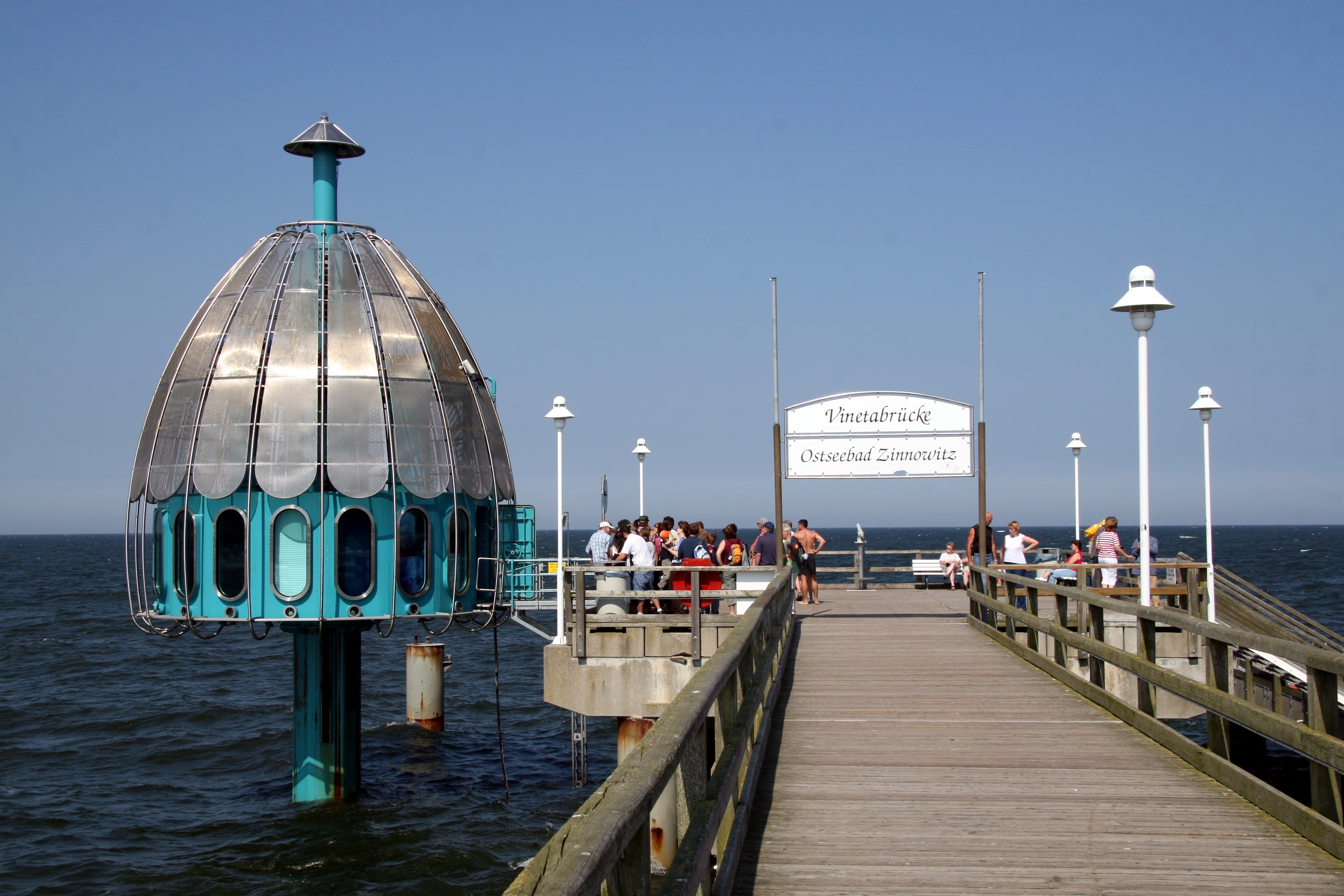 Vinetabrücke, Zinnowitz, Ostsee